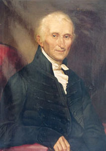 Сава Текелија (1761-1842), слика је дело Јована Поповића (1810-1864). Извор